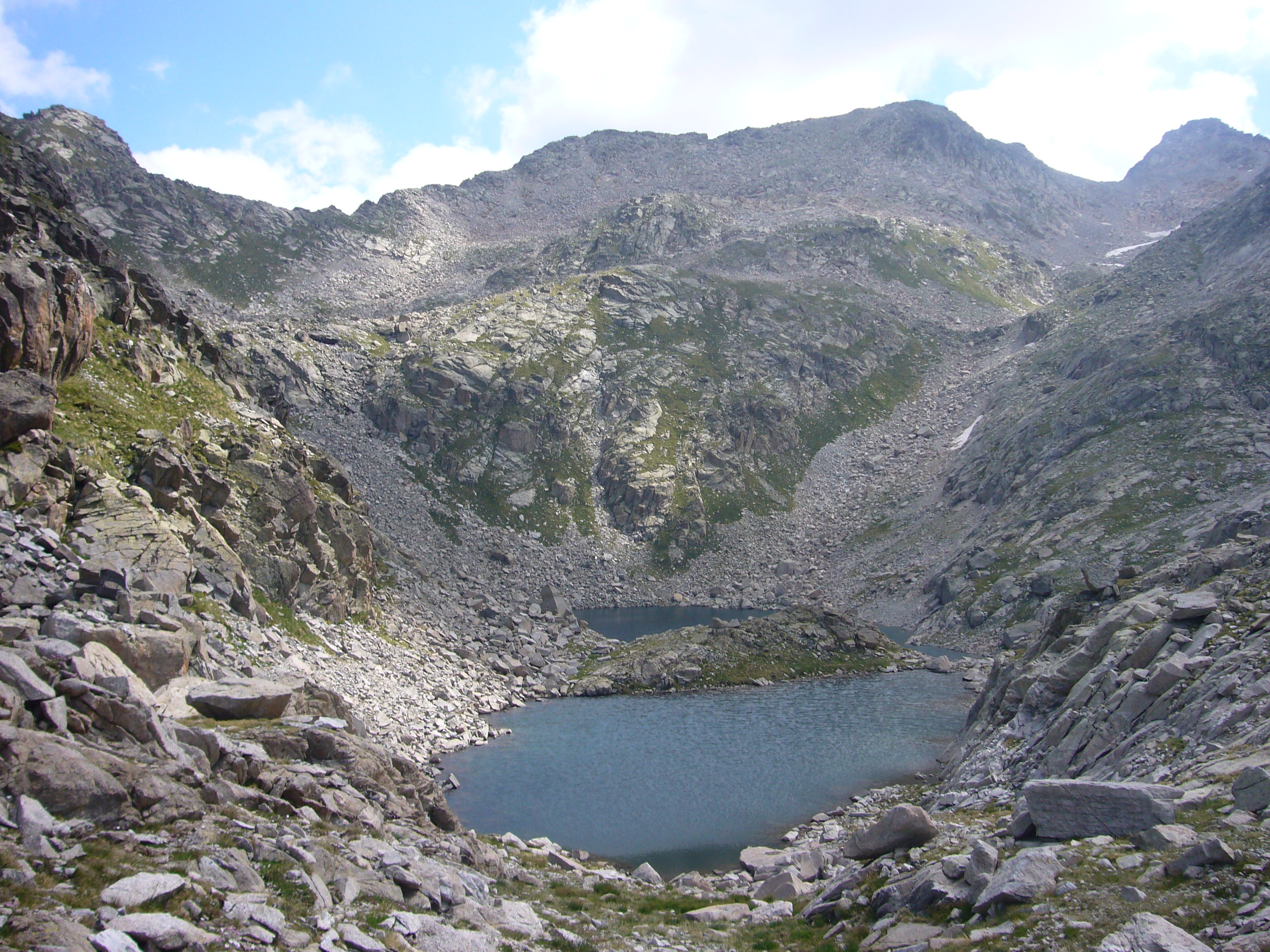 Estanyet i Estany Superior de Comalesbienes, i Crestells de Colieto, vists des del Circ de Comalesbienes; la Vall de Boí, Alta Ribagorça, Catalunya